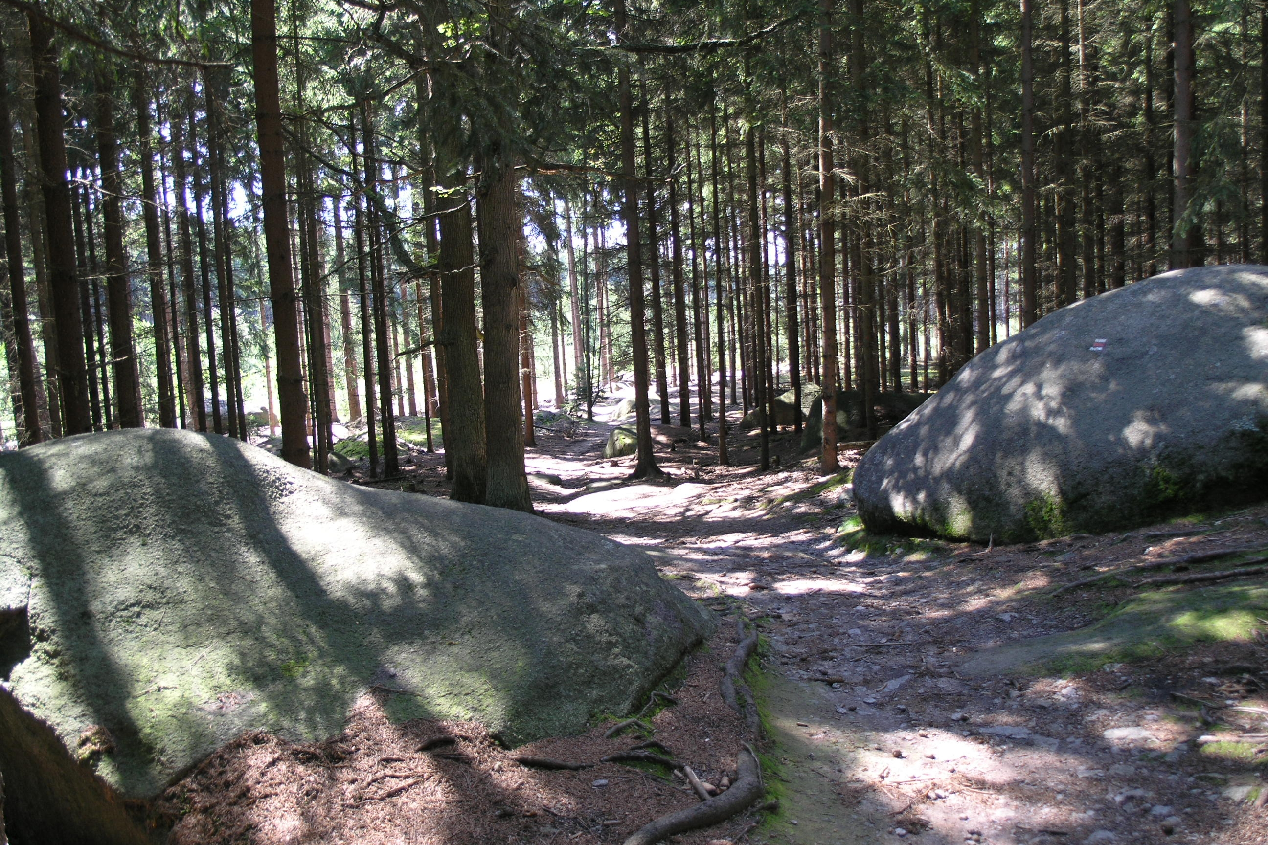 Přírodní park Horní Střela